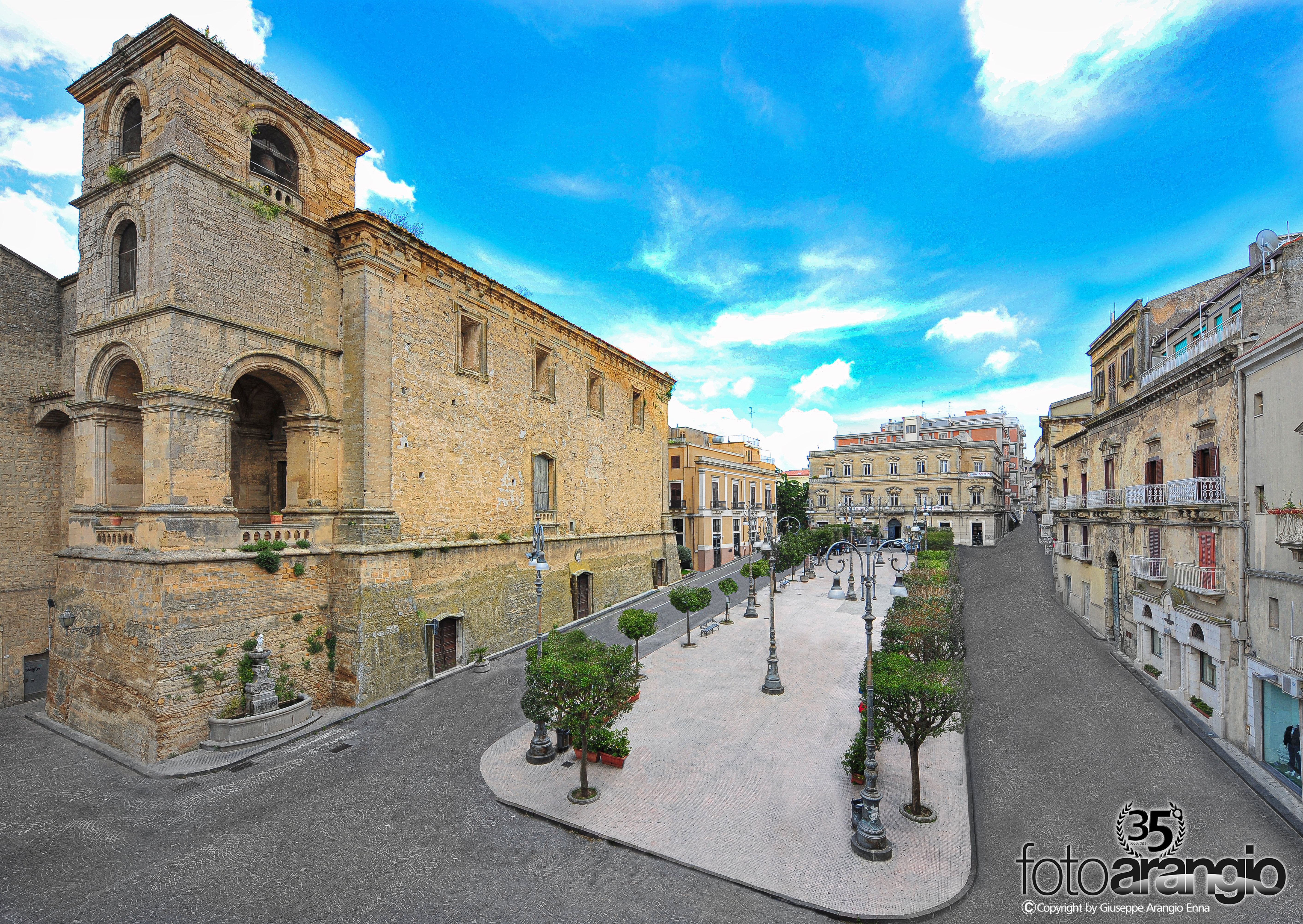 Piazza Vittorio Emanuele, al centro di Enna